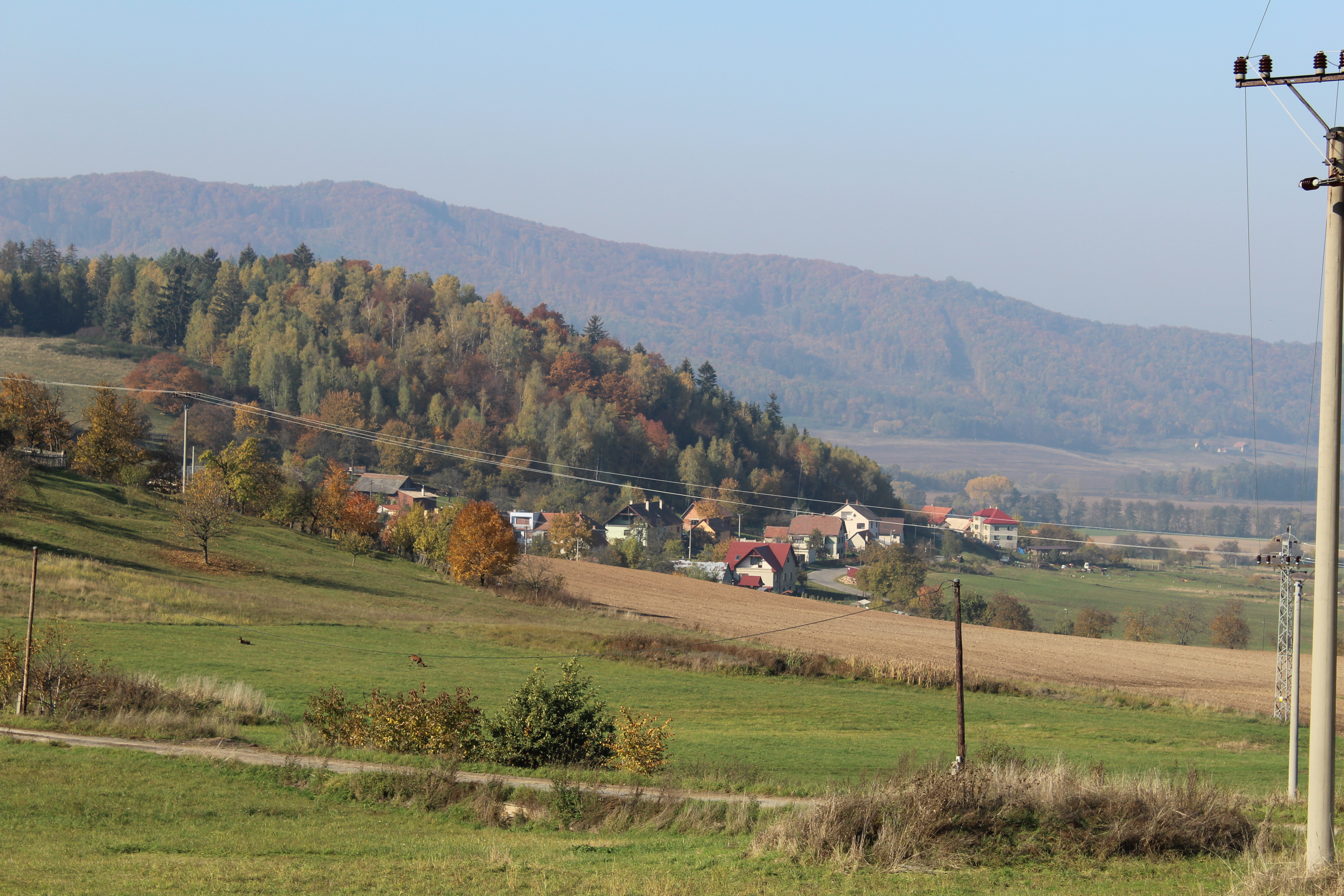 Klokoč